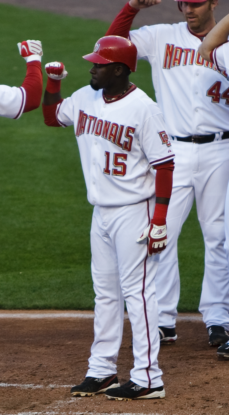 Cristian Guzmán